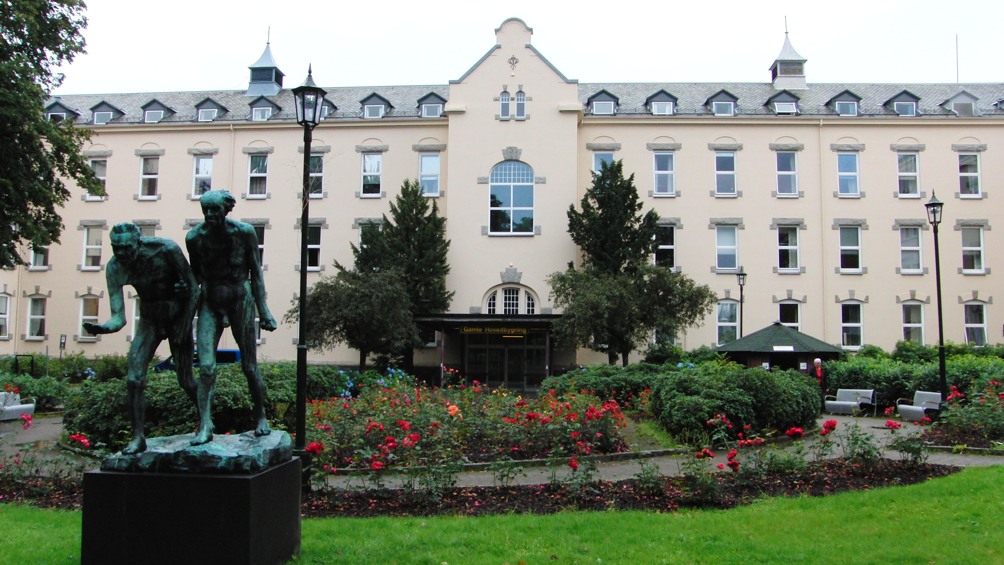 Description=Haukeland Universitetssykehus